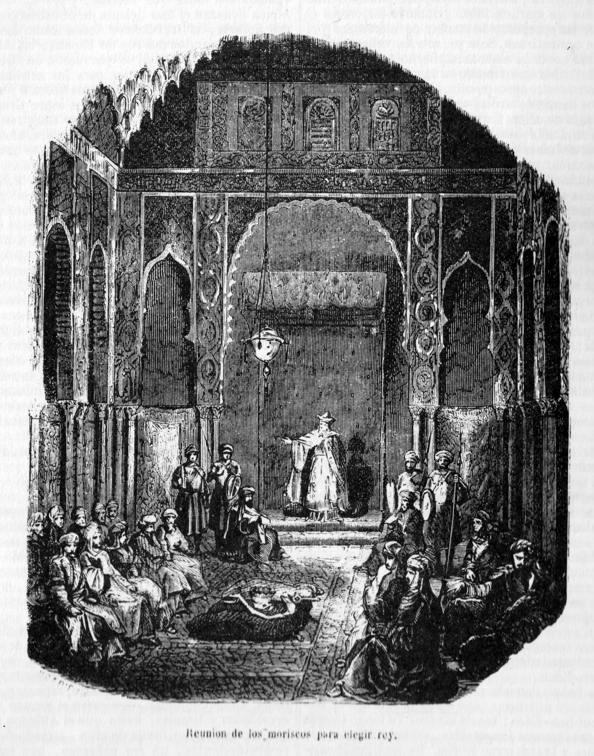 Reunion de los moriscos para eligir el rey